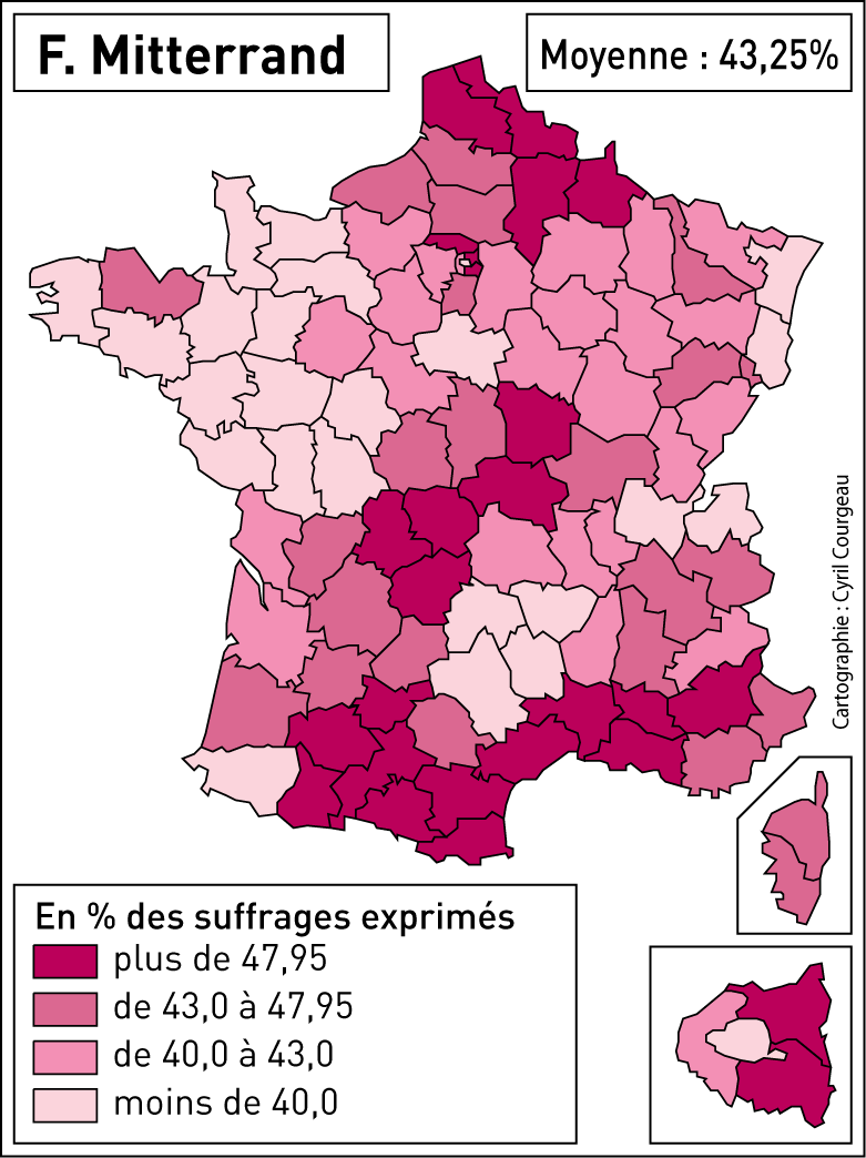 Elections présidentielles en France 1er tour Mitterrand